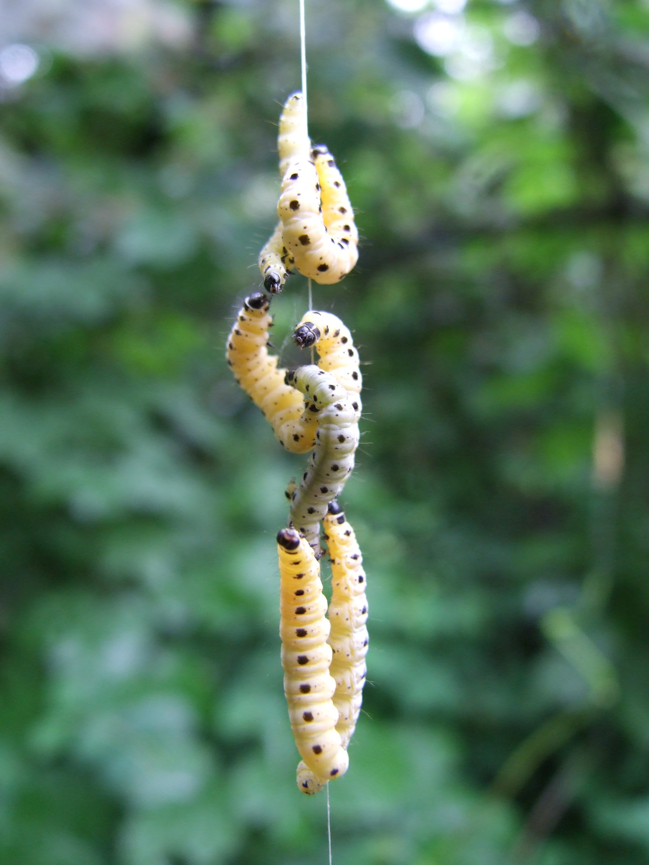 Gespinstmottenraupen